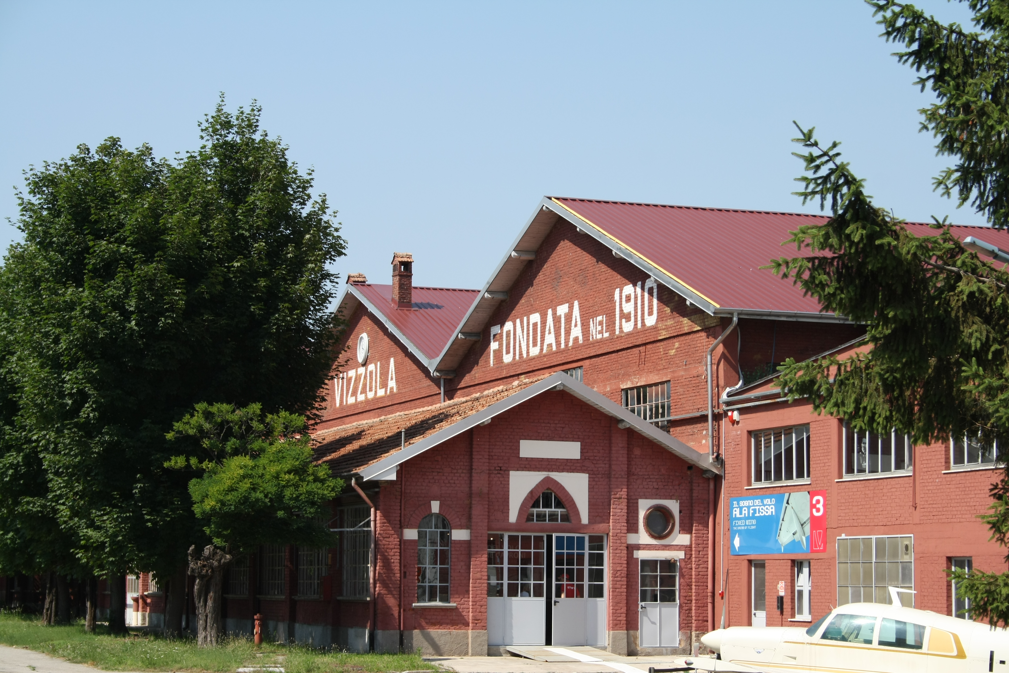 Officine Aeronautiche Caproni.